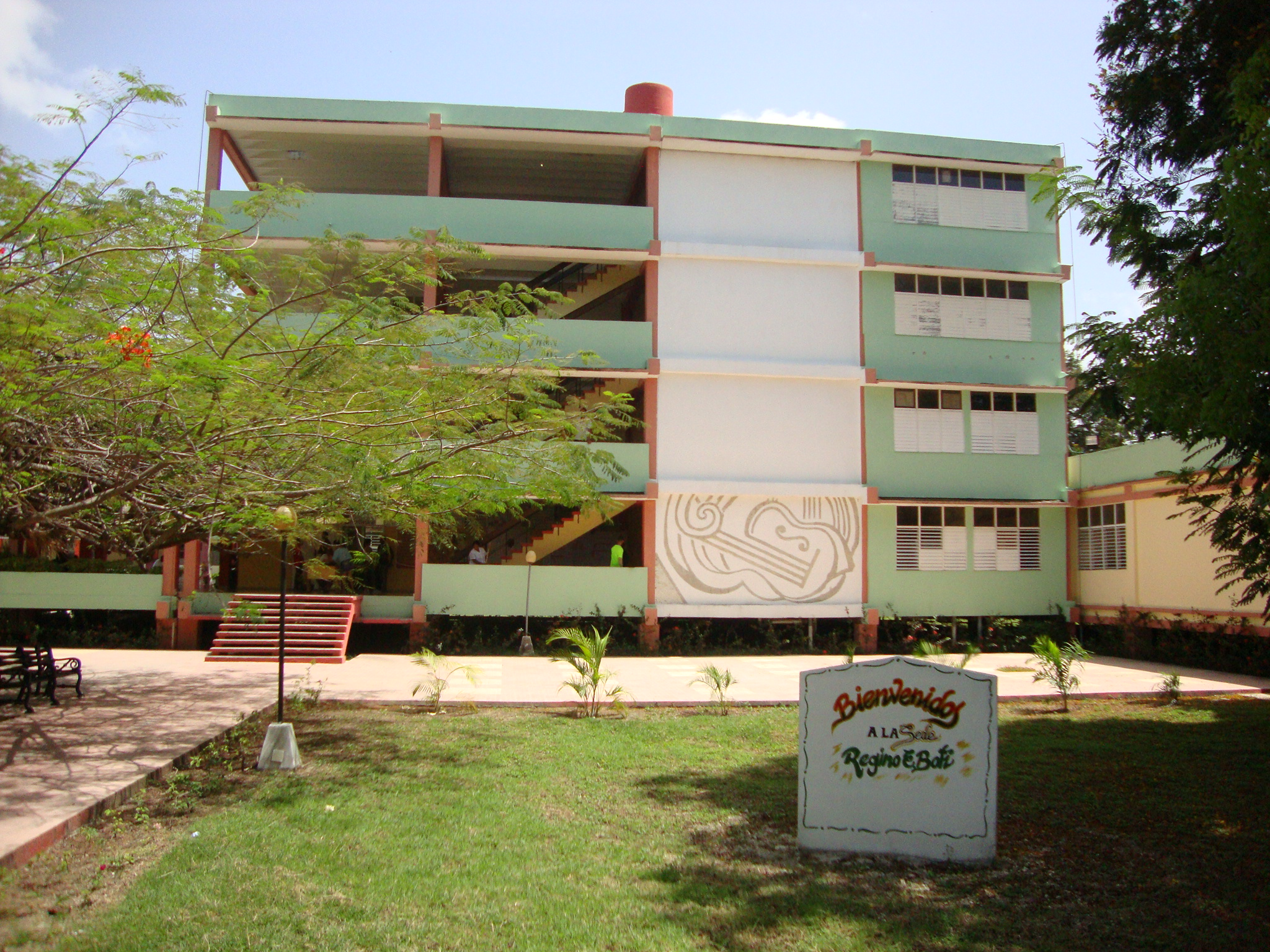 Sede